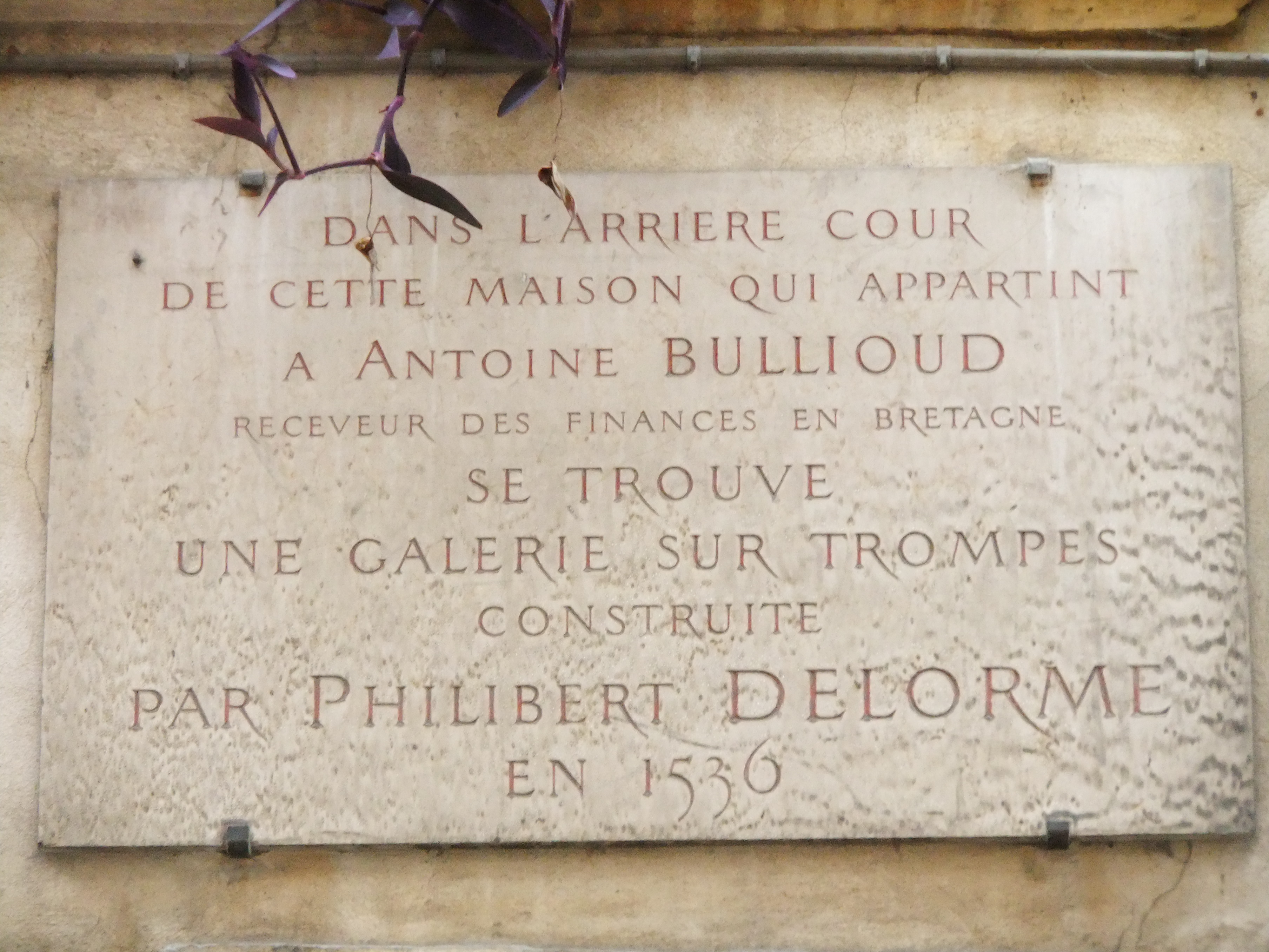 Plaque informative de la galerie construite par Philibert Delorme, se trouvant devant l’hôtel Bullioud, 8 rue juiverie, Lyon-5e